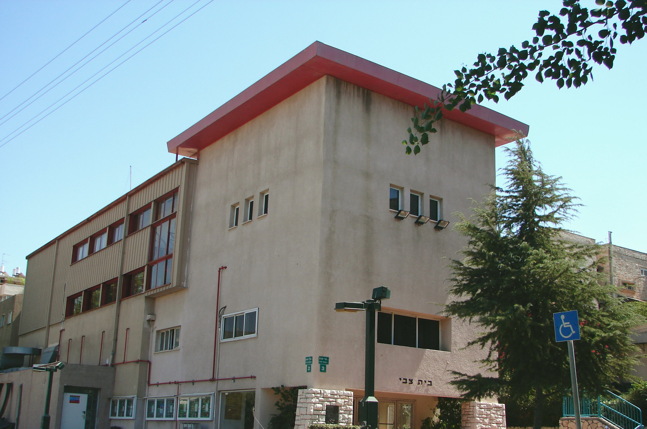 Beit Zvi Drama School, Ramat Gan, Israel